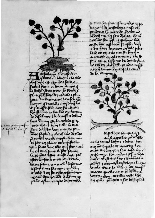 Manuscrit Livre des simples médecines de Platearus, XII e siècle, traduit en français